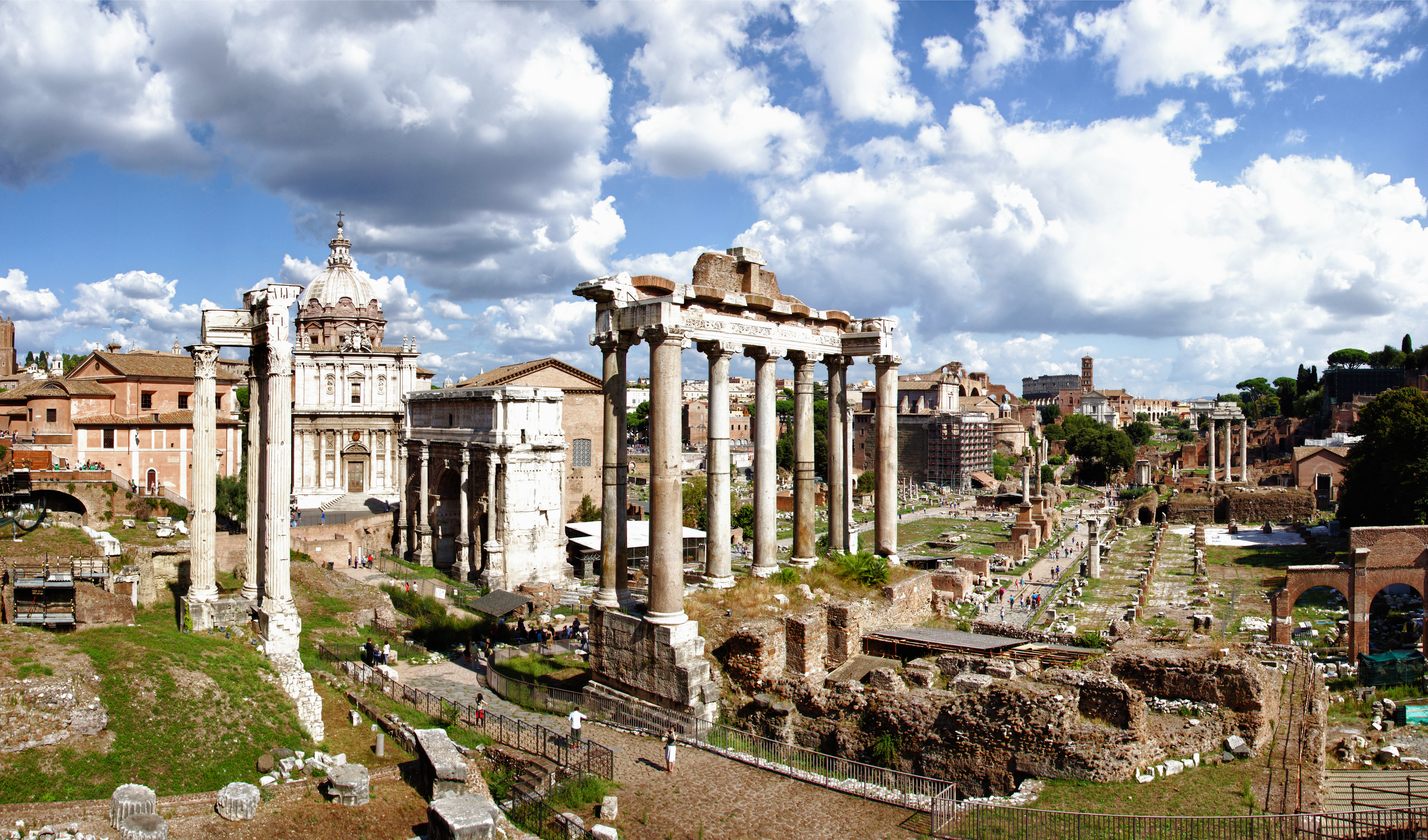 Roma / Rome - Lazio - Italia / Italy